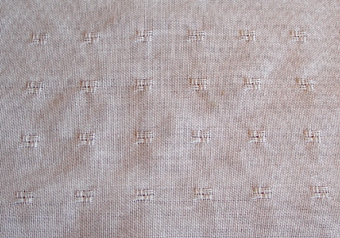 Denna gardin är vävd i tuskaft med detaljer i stramalj. Flotteringar förekommer samtidigt i varp- och inslagsled. Se även detalj här